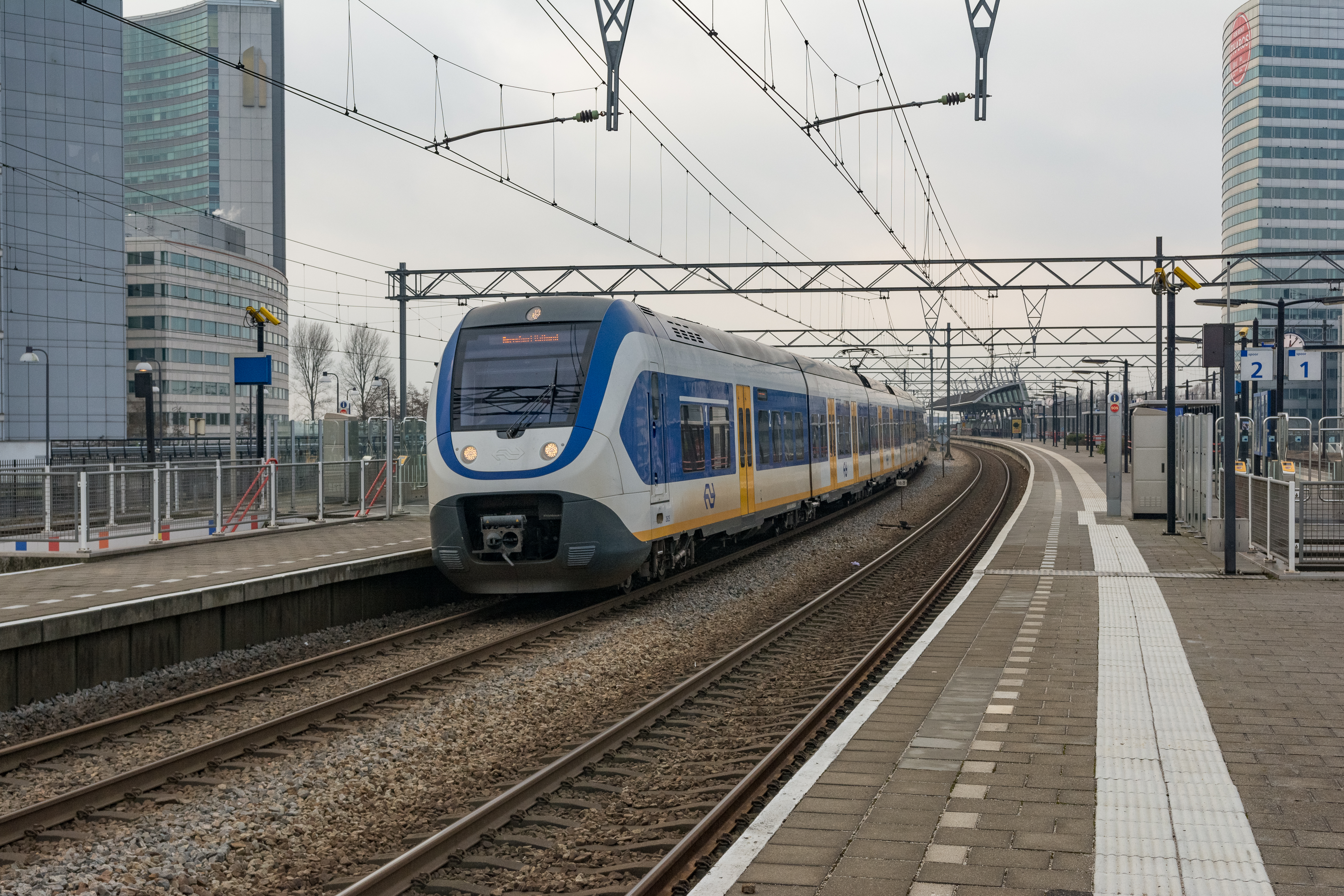 SLT 2625 vertrekt als Sprinter 5843 uit Hoofddorp via Amsterdam Centraal naar Amersfoort Vathorst.